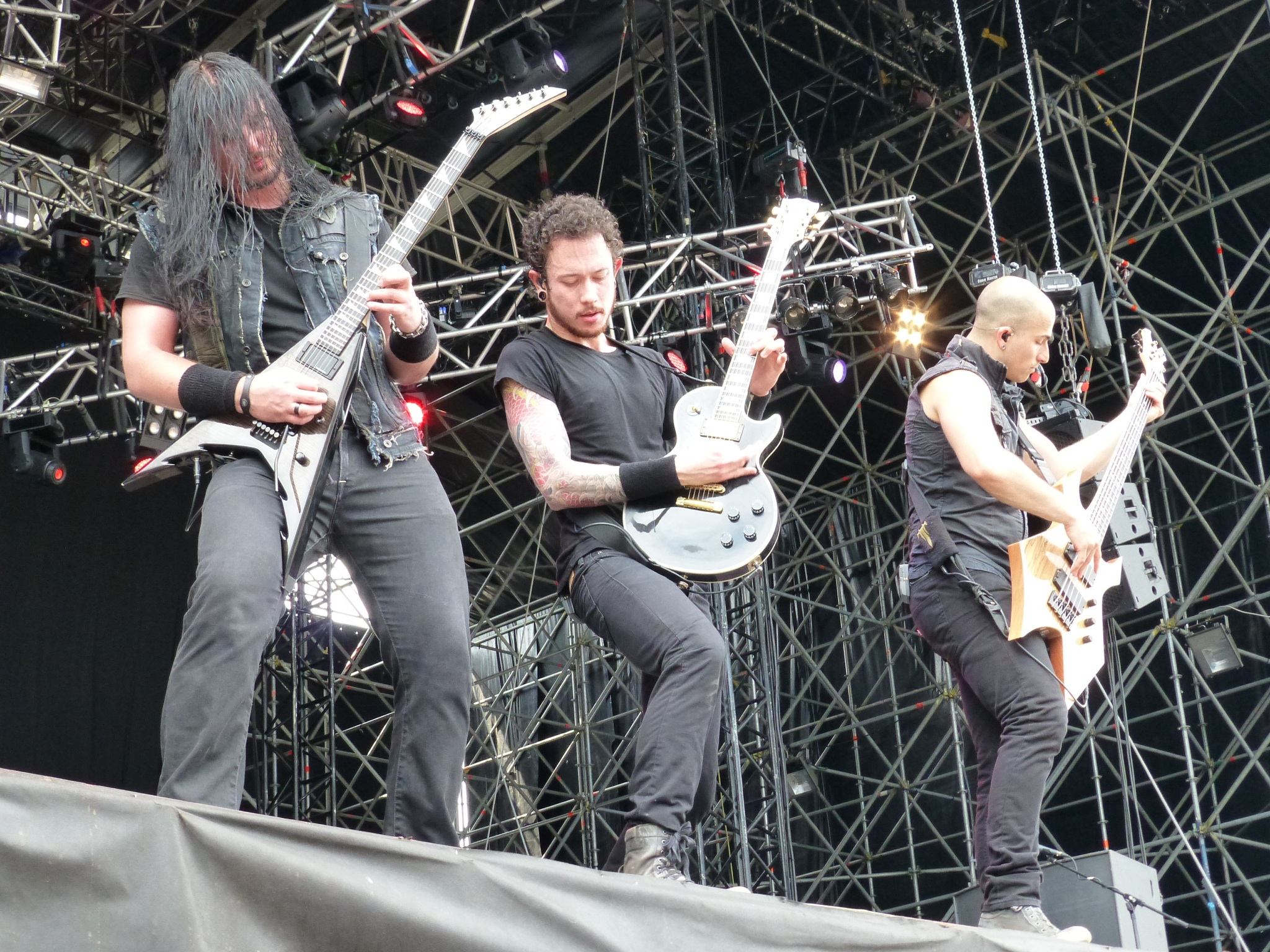 Trivium at Gods Of Metal 2012, Milan, Italy